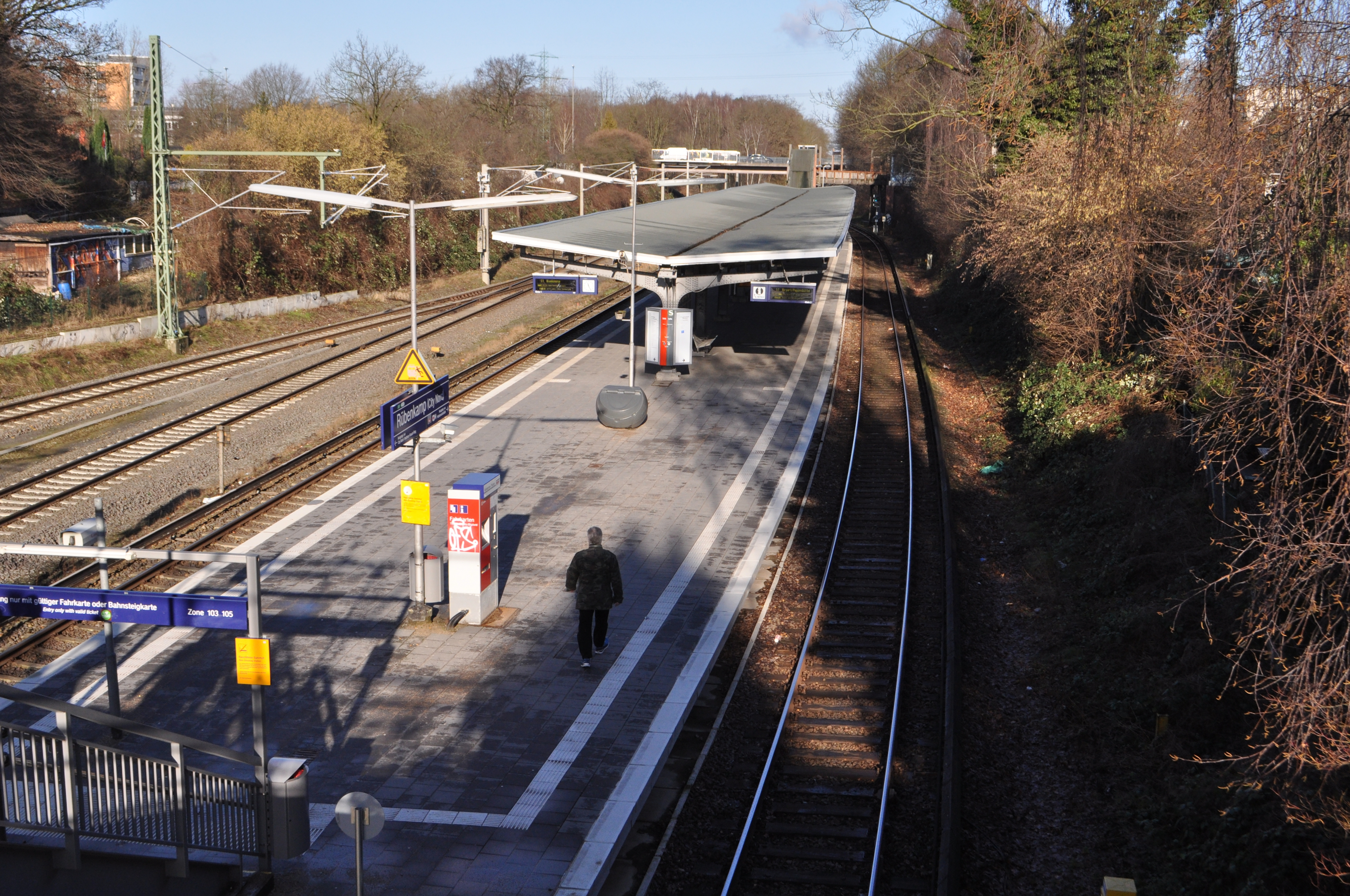 Bahnsteig des S-Bahnhofs Rübenkamp in Hamburg-Barmbek-Nord.